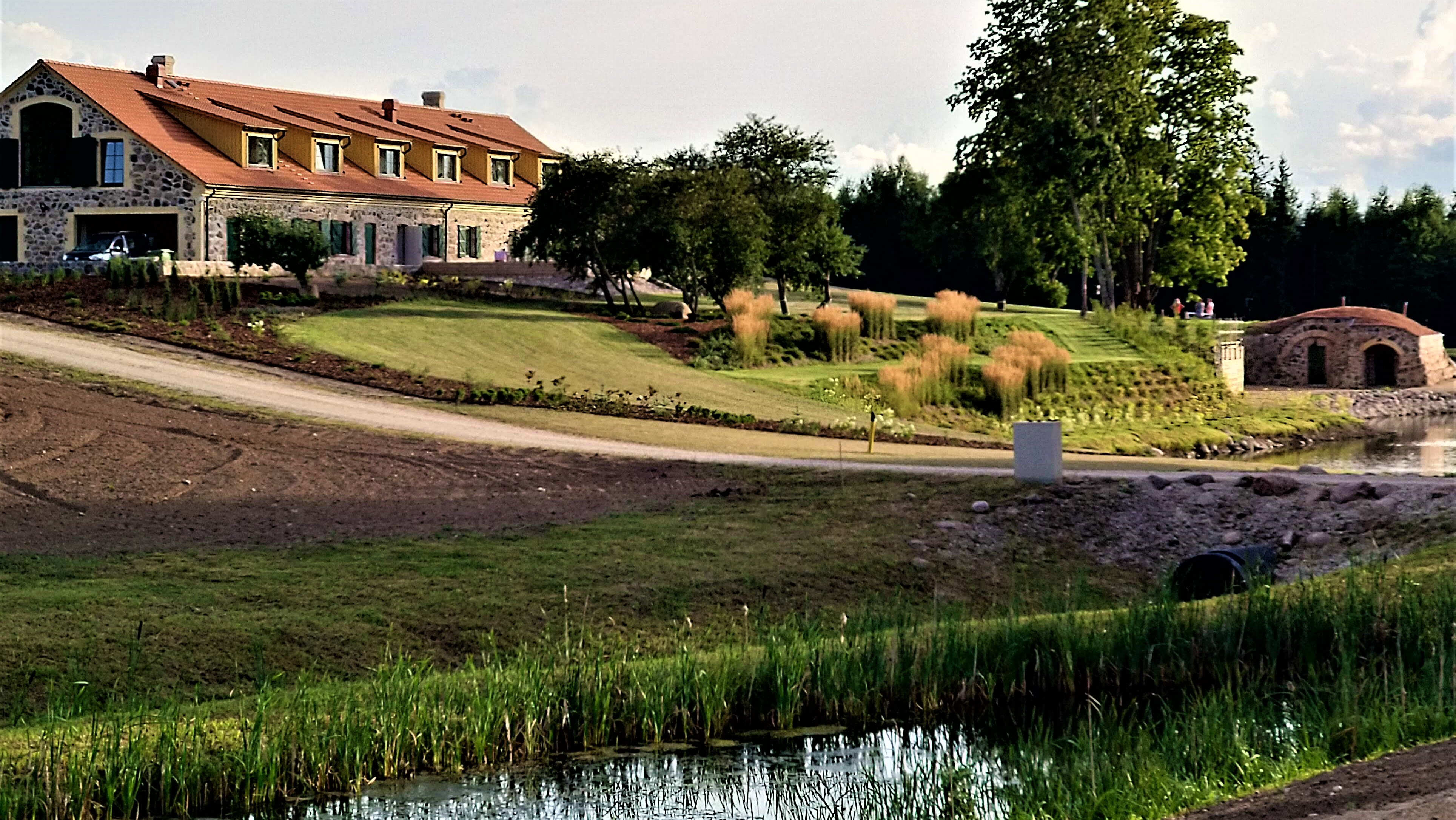 Morna õnne talu peamaja ja veinikelder kirdesuunast.